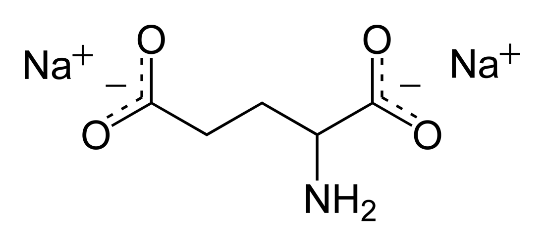 Skeletal formula of disodium glutamate